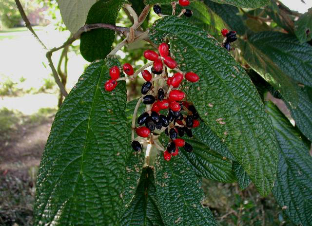 Viburnum rhytidophyllum